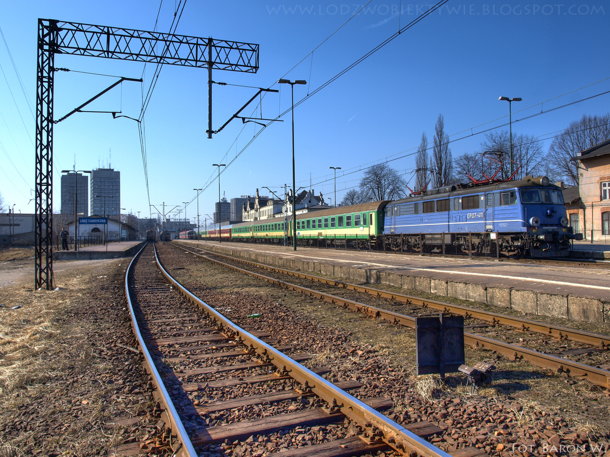 TLK do Warszawy gotowy do odjazdu